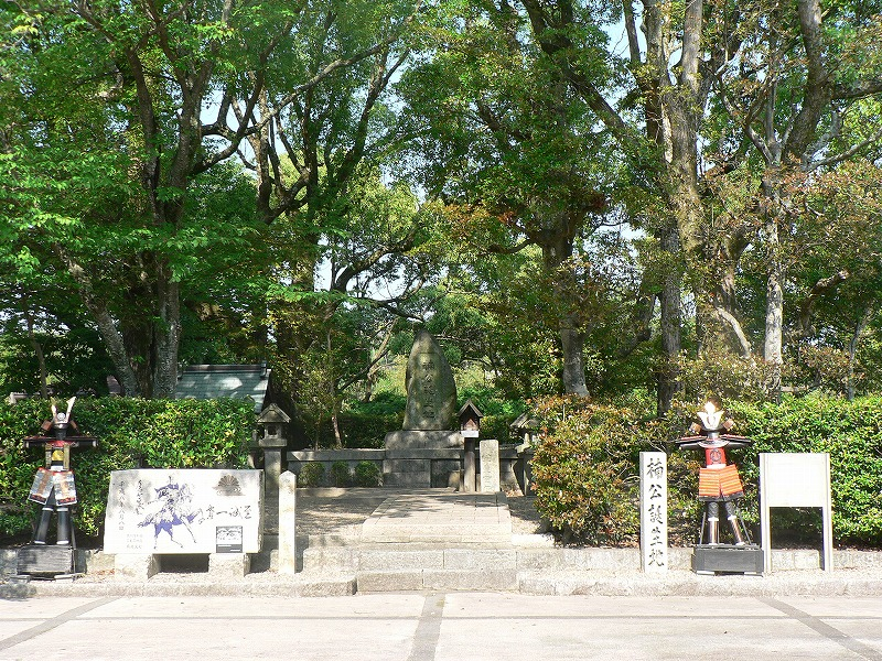 Kusunoki Masashige birth place at Chihayaakasaka village , Osaka, Japan （千早赤阪村にあるja:楠木正成の生誕地）